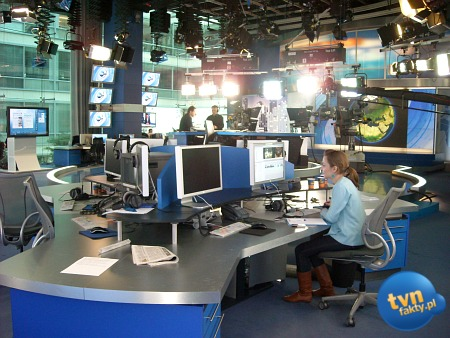 Newsroom TVN24 i "Faktów" w Warszawie